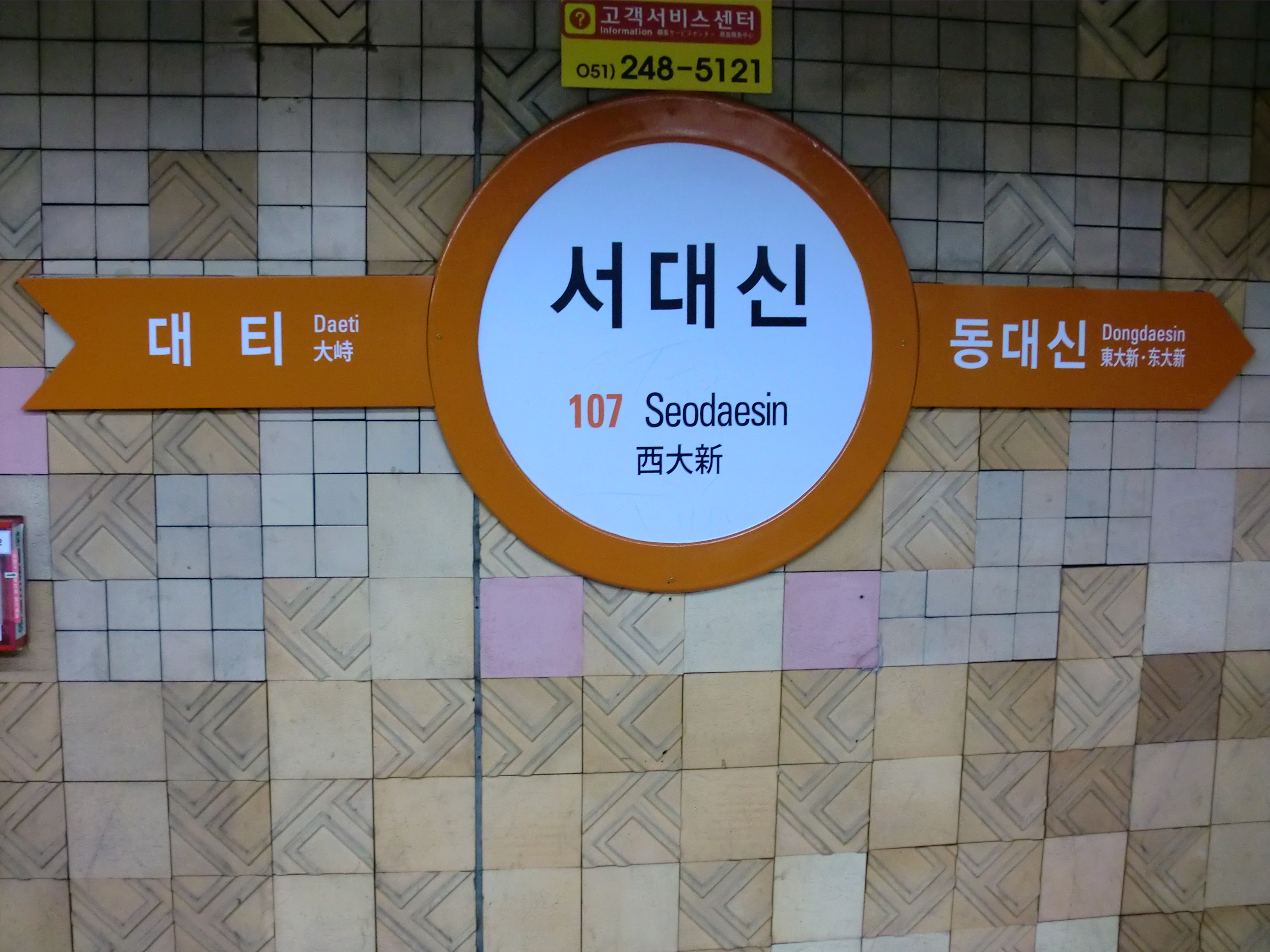 부산도시철도 1호선 서대신역의 역명판